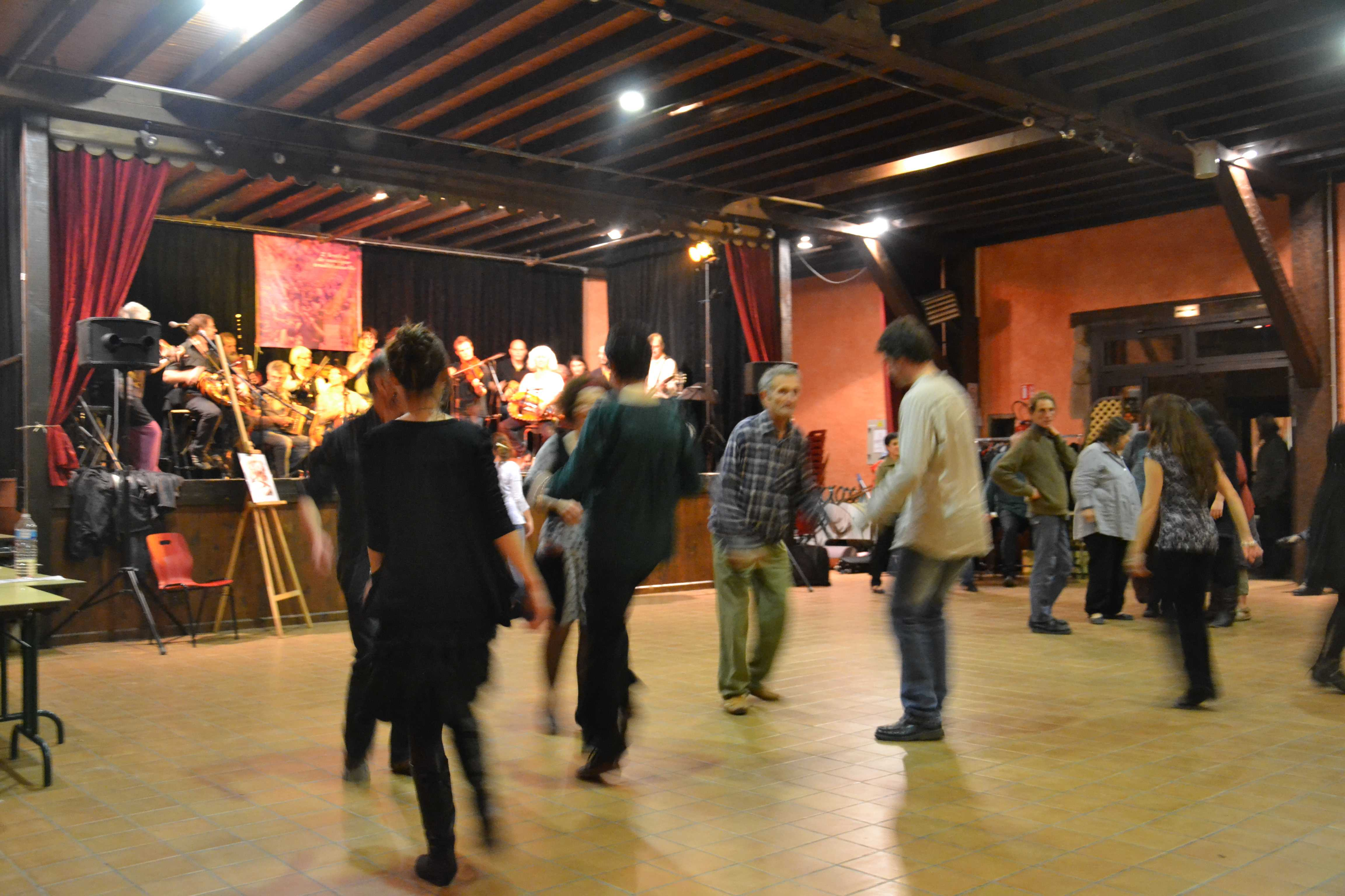 Danseurs de sautière, Veyrac, 2011.